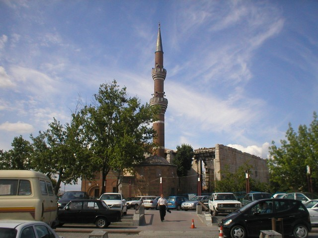 Hacıbayram Camii